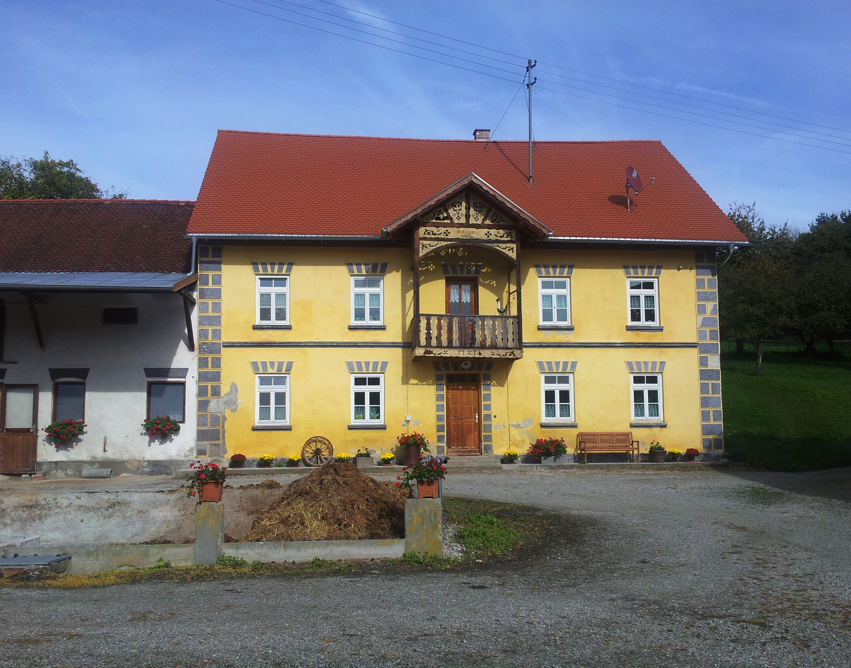 Wohnhaus des Bauernhofs in Haxthausen; zweigeschossiger Satteldachbau mit Rustikagliederung und verziertem hölzernem Balkon, bez. 1907 This is a photograph of an architectural monument.